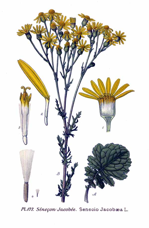 Senecio jacobaea L.